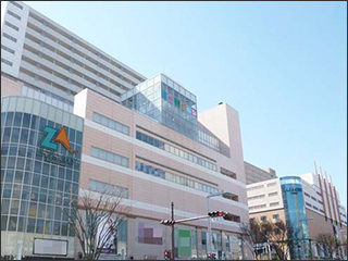 ザザシティ（ヒーローズアカデミーが入るビル）